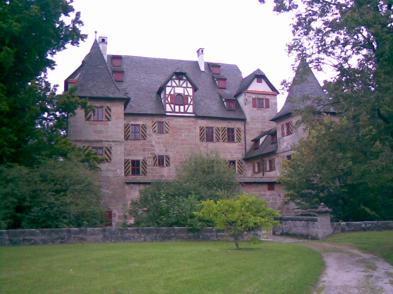 Petzsches Schloss in Schwarzenbruck bei Nürnberg, Schlosshof 1-9